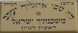 Rishon LeZion Great Synagogue, Israel בית הכנסת הגדול בראשון לציון